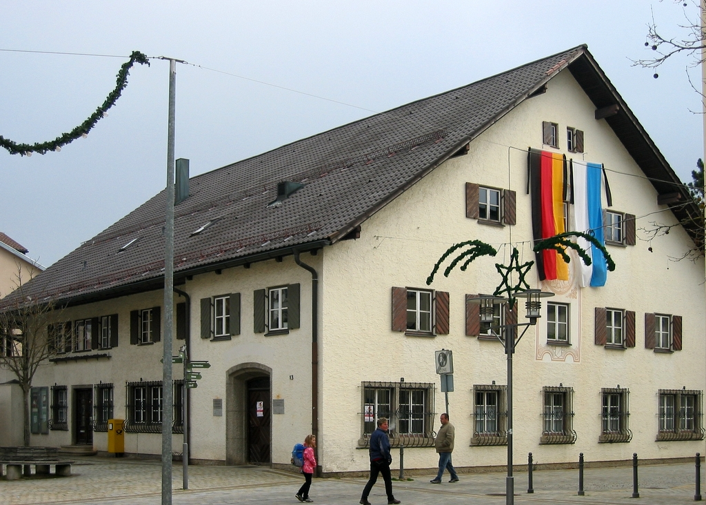 Ehemaliges Rathaus von Marktoberdorf, heute Gesundheitsamt